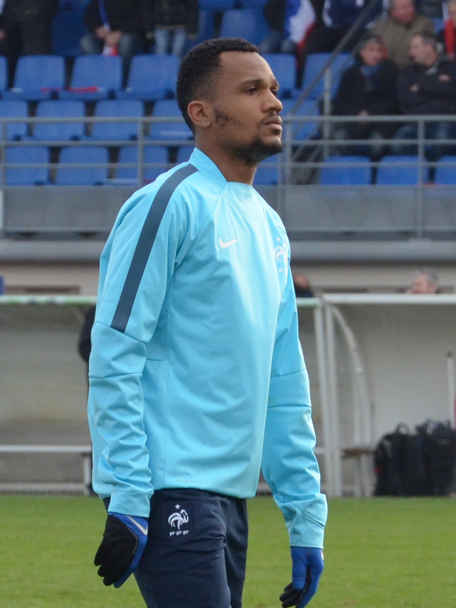 Photographie prise lors du match opposant la France à l'Angleterre pour les qualifications du championnat d'Europe de football des moins de 19 ans 2015 au stade Louis-Villemer de Saint-Lô le 31 mars 2015. Ici, Nicolas Senzemba.